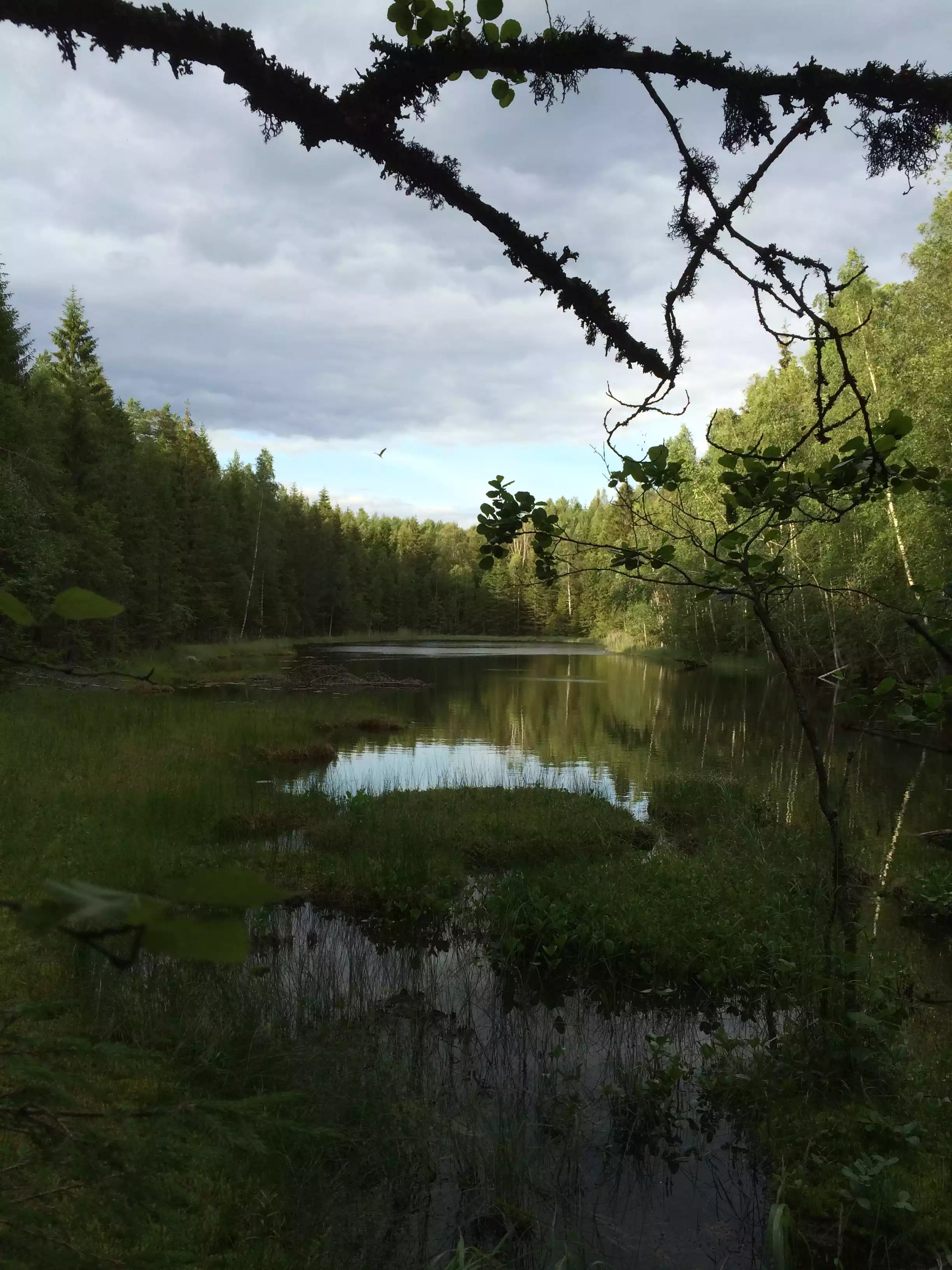 Langtjenn ved Puttedalen på Lierfoss i Aurskog-Høland kommune.